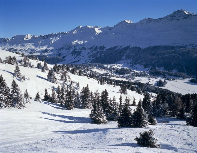 Valbella mit Rothorn im Hintergrund Rumantsch: Valbella cugl Corn Cotschen davos ve